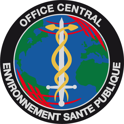 Écusson de l'Office central de lutte contre les atteintes à l'environnement et à la santé publique (OCLAESP)